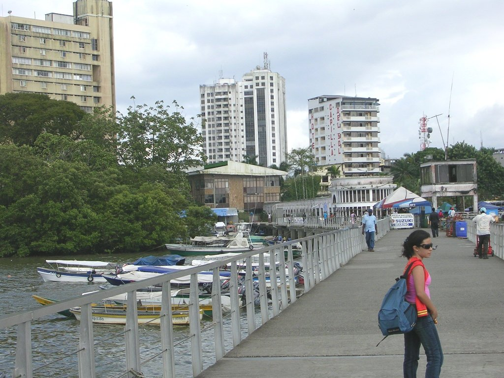 entrada al muelle turistico en buenaventura colombia. municipio del departamento del valle del cauca. principal puerto fluvial de colombia, y futuro eje ecoturistico del pais.por: hertziodj